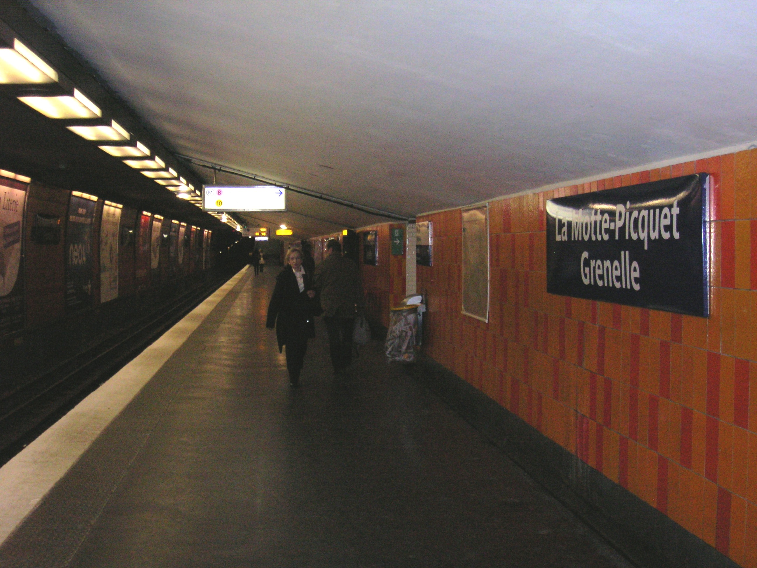 Demi station La Motte-Picquet Grenelle de la ligne 8 direction Balard du métro de Paris.